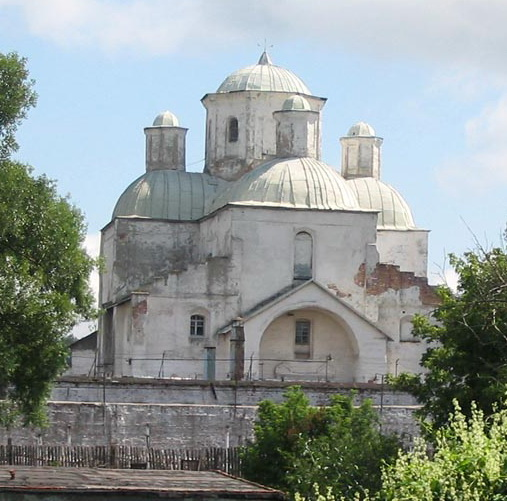 Категорія:Зображення:Шосткинський район Категорія:Зображення:Храми Сумської області